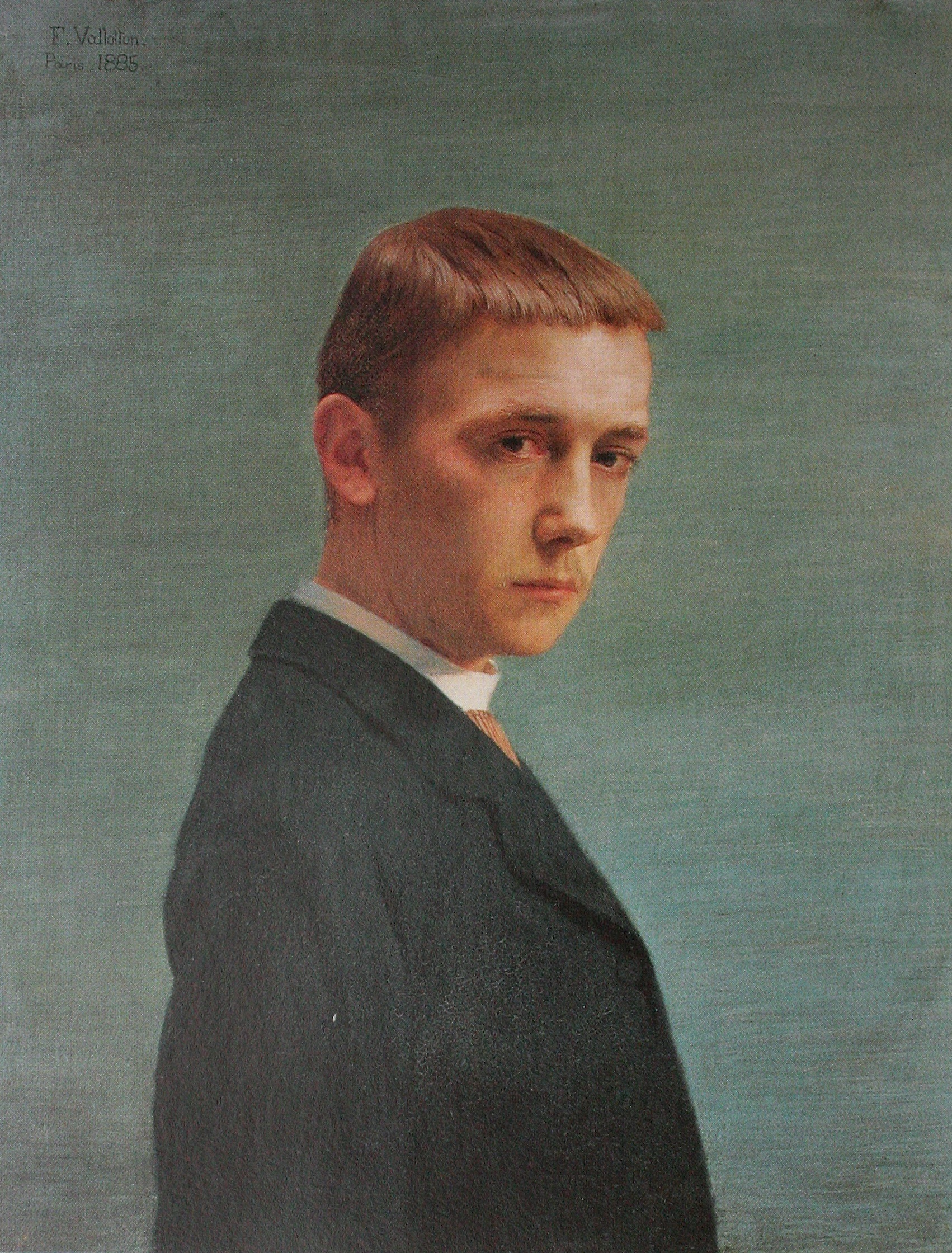 Mon portrait, Gemälde von Félix Vallotton, 1885